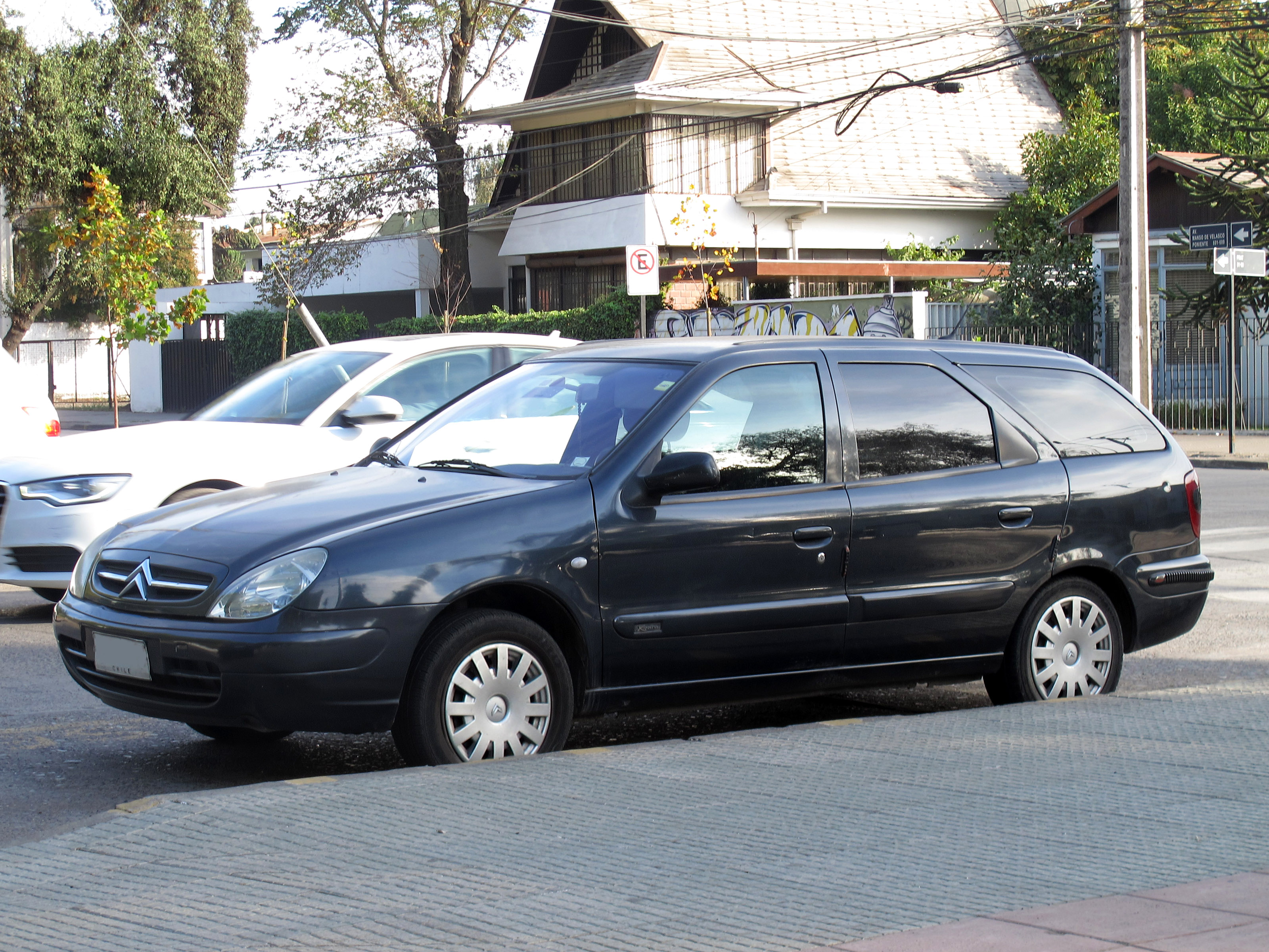 Citroen Xsara SX 1.9 HDi Break 2004